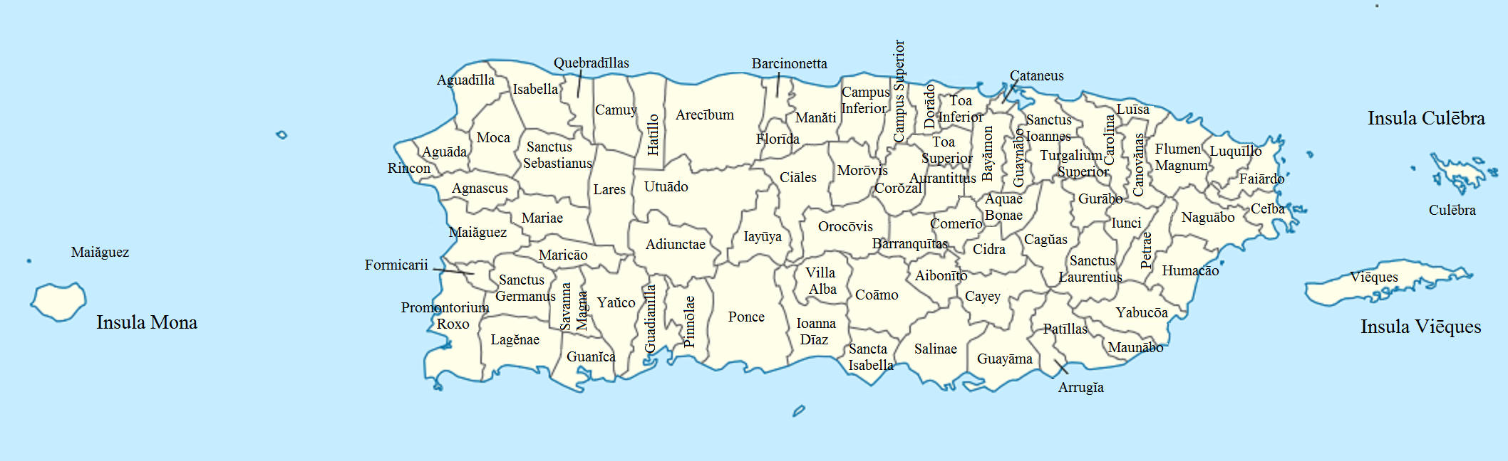 Tabula Portorici municipia ostendens